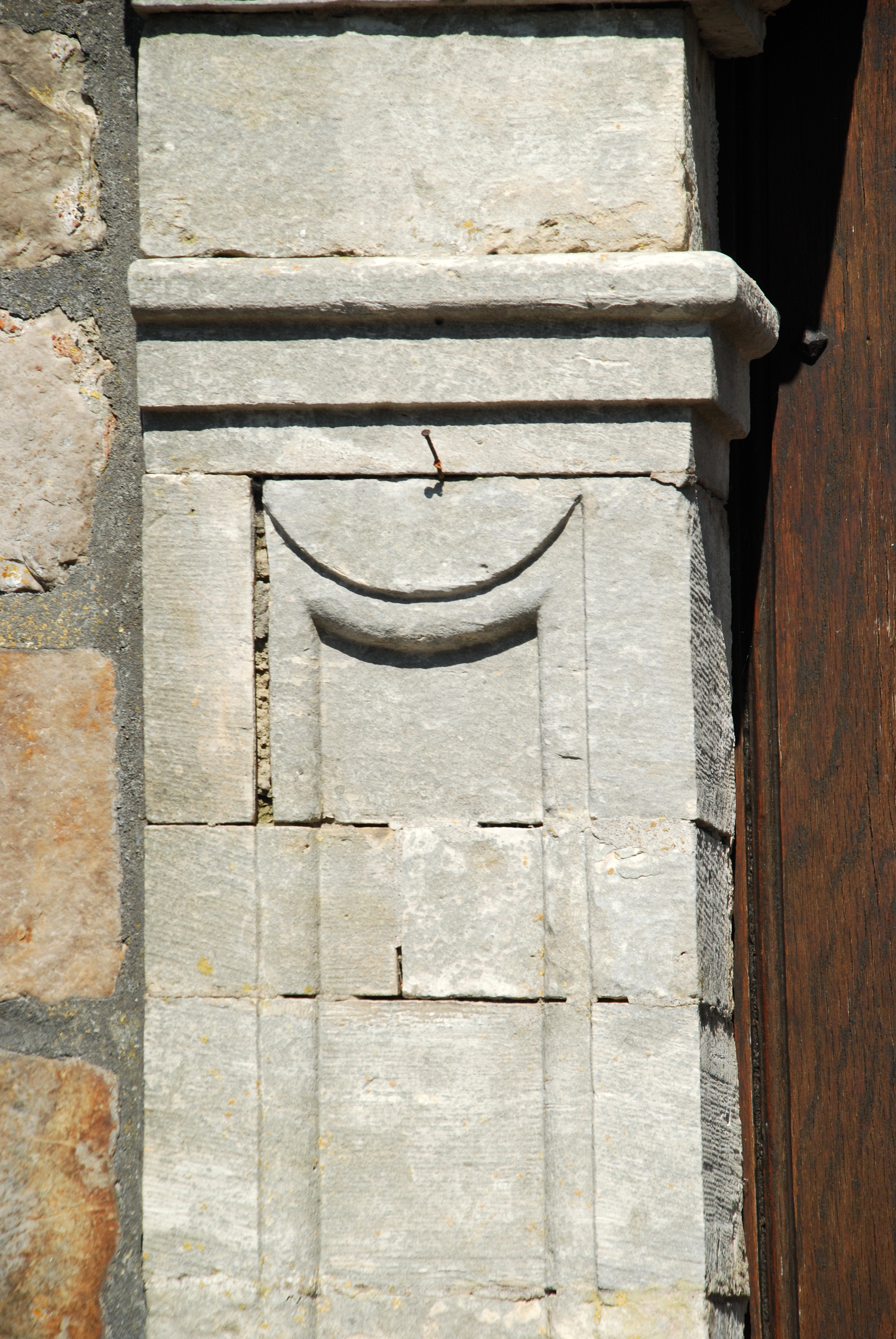 Belgique - Brabant wallon -Orp-le-Grand - Église Saint-Pierre de Jandrain